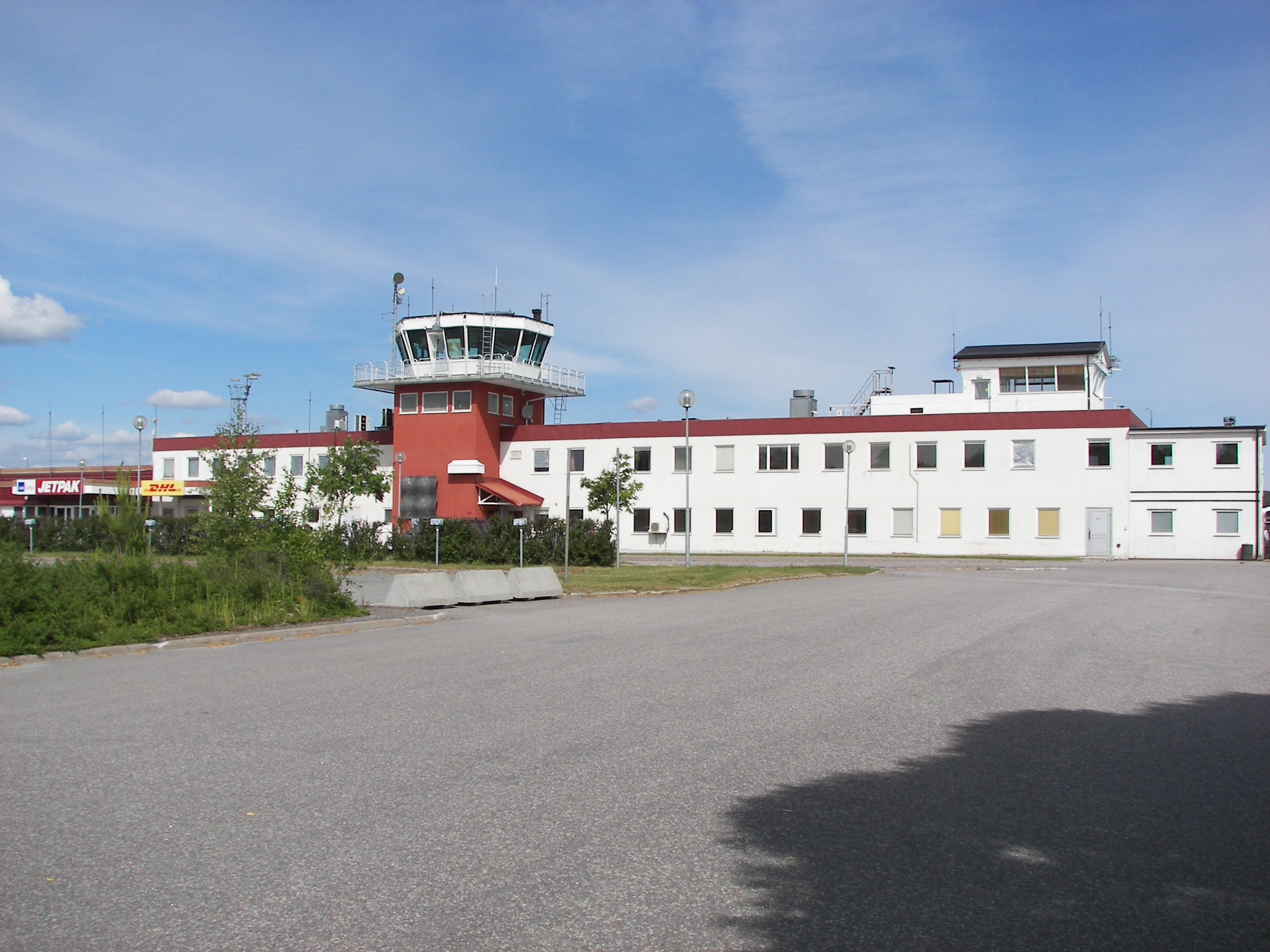 Old terminal at Sundsvall-Timrå Airport